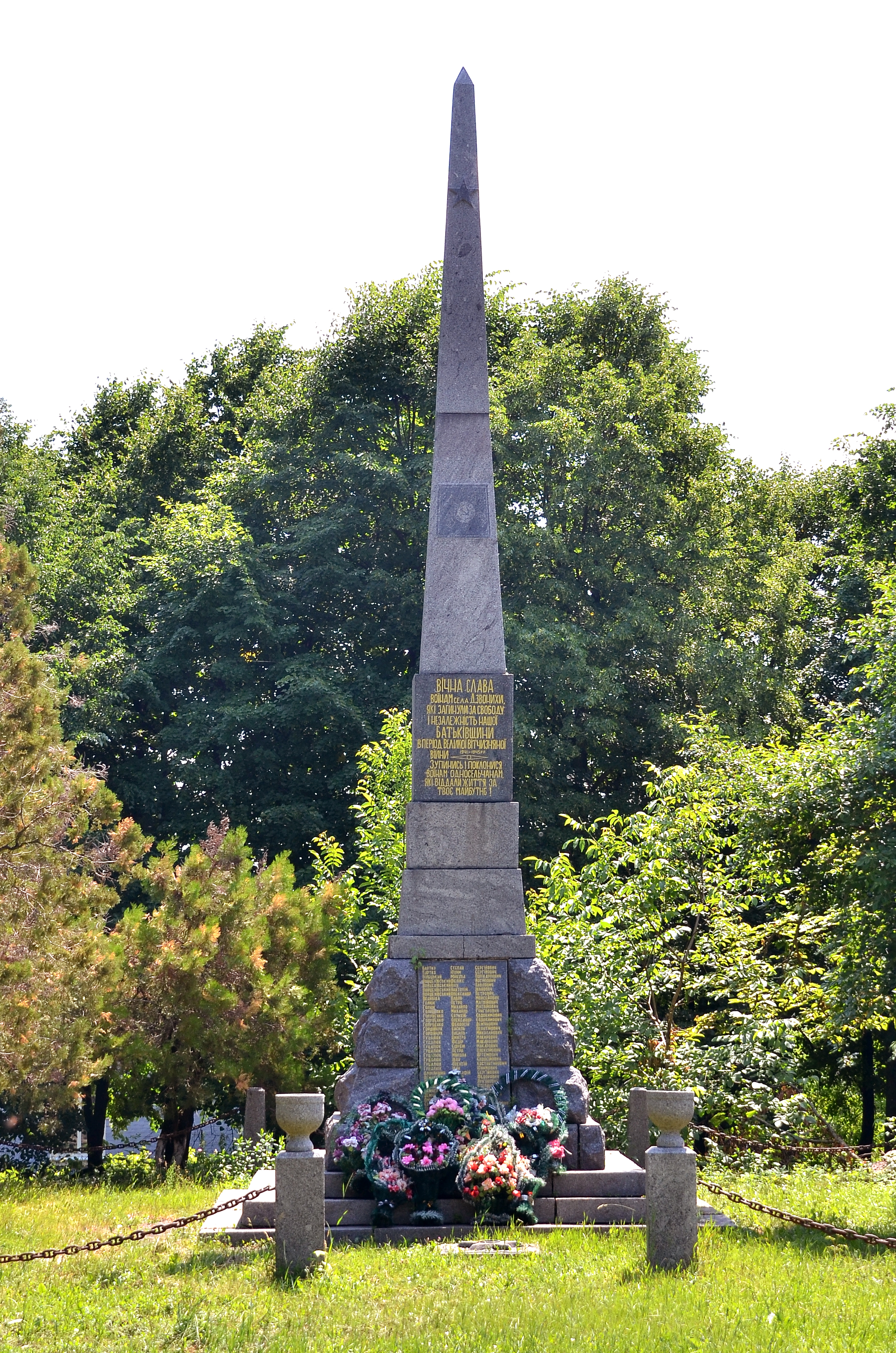 Пам’ятник 129 воїнам – односельчанам, загиблим на фронтах ВВВ, с. Дзвониха, Дзвониська с/р, біля контори КСП